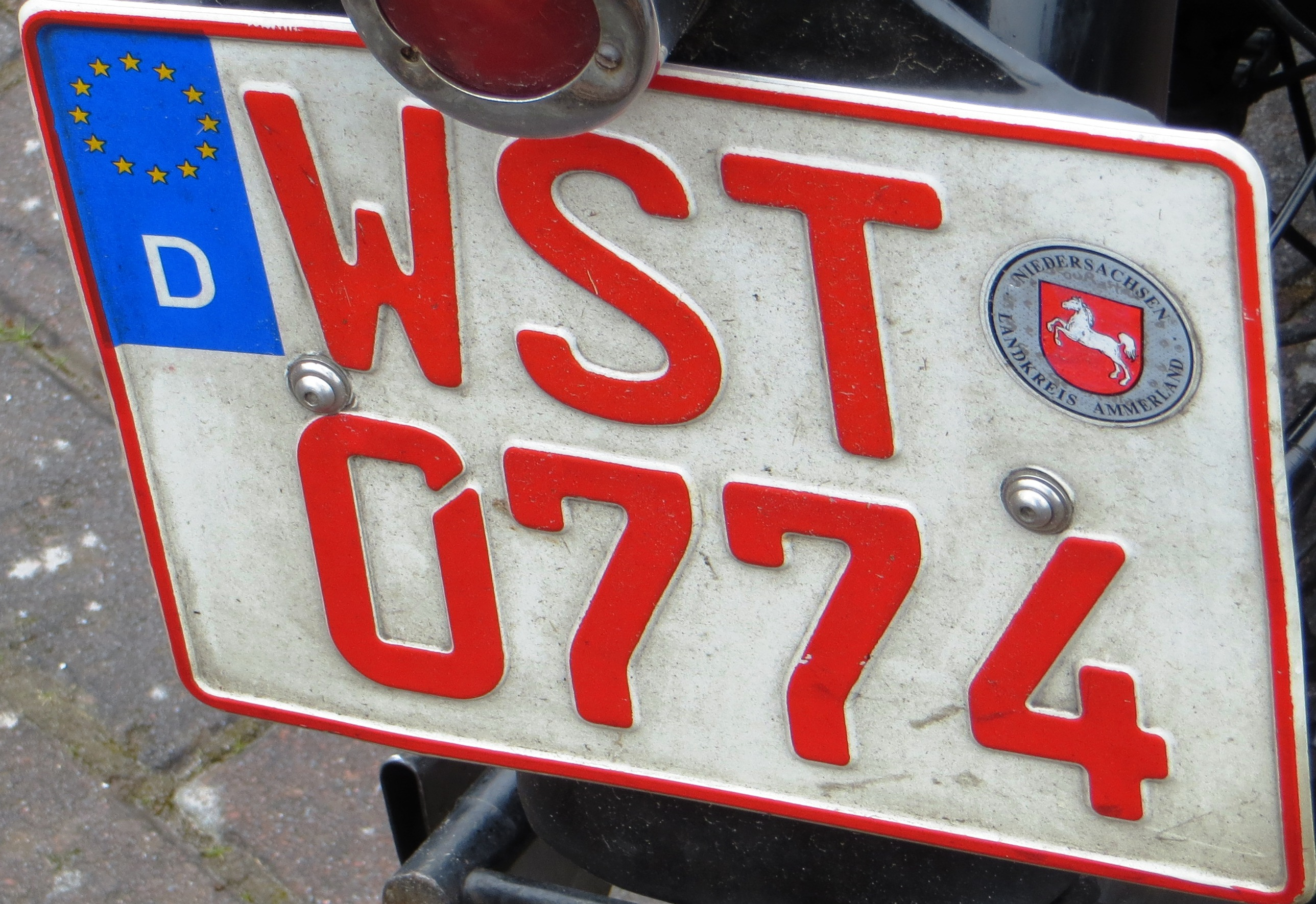 oldtimer kentekenplaat Duitsland